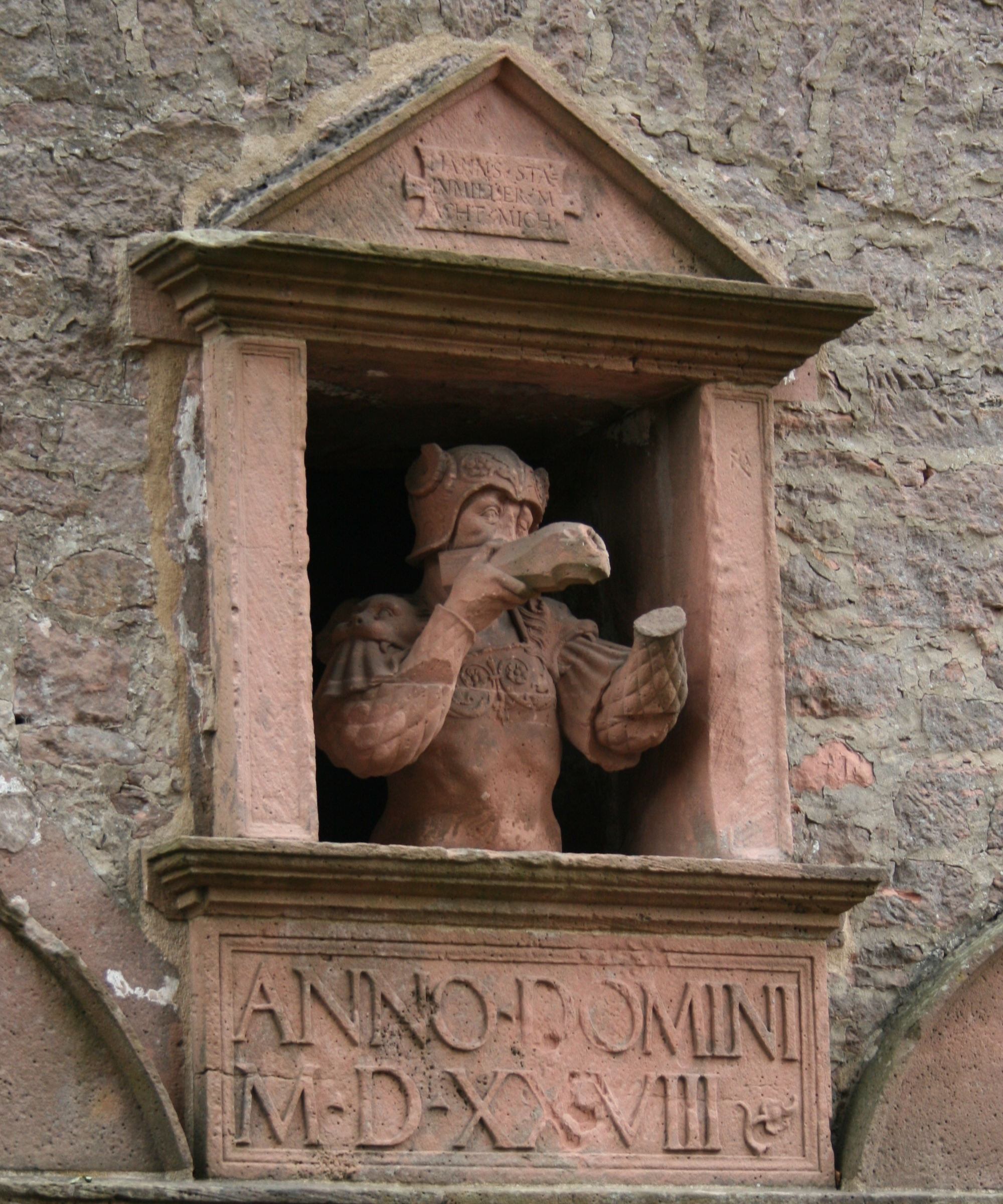 Burg Breuberg, Armbrustschütze im Portal des Wertheimer Zeughauses, 1528.